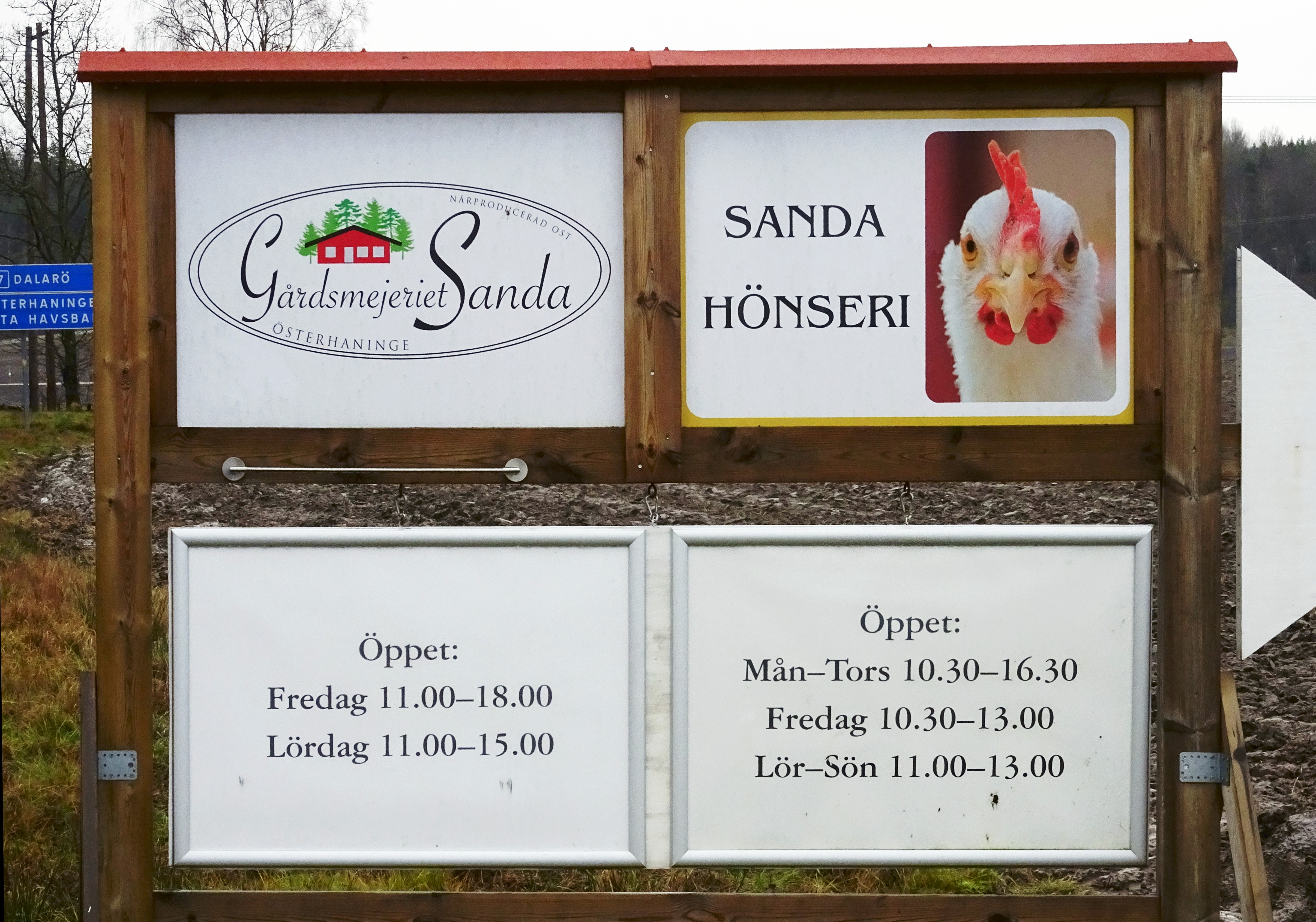 Sanda gård, skylt vid Dalarövägen